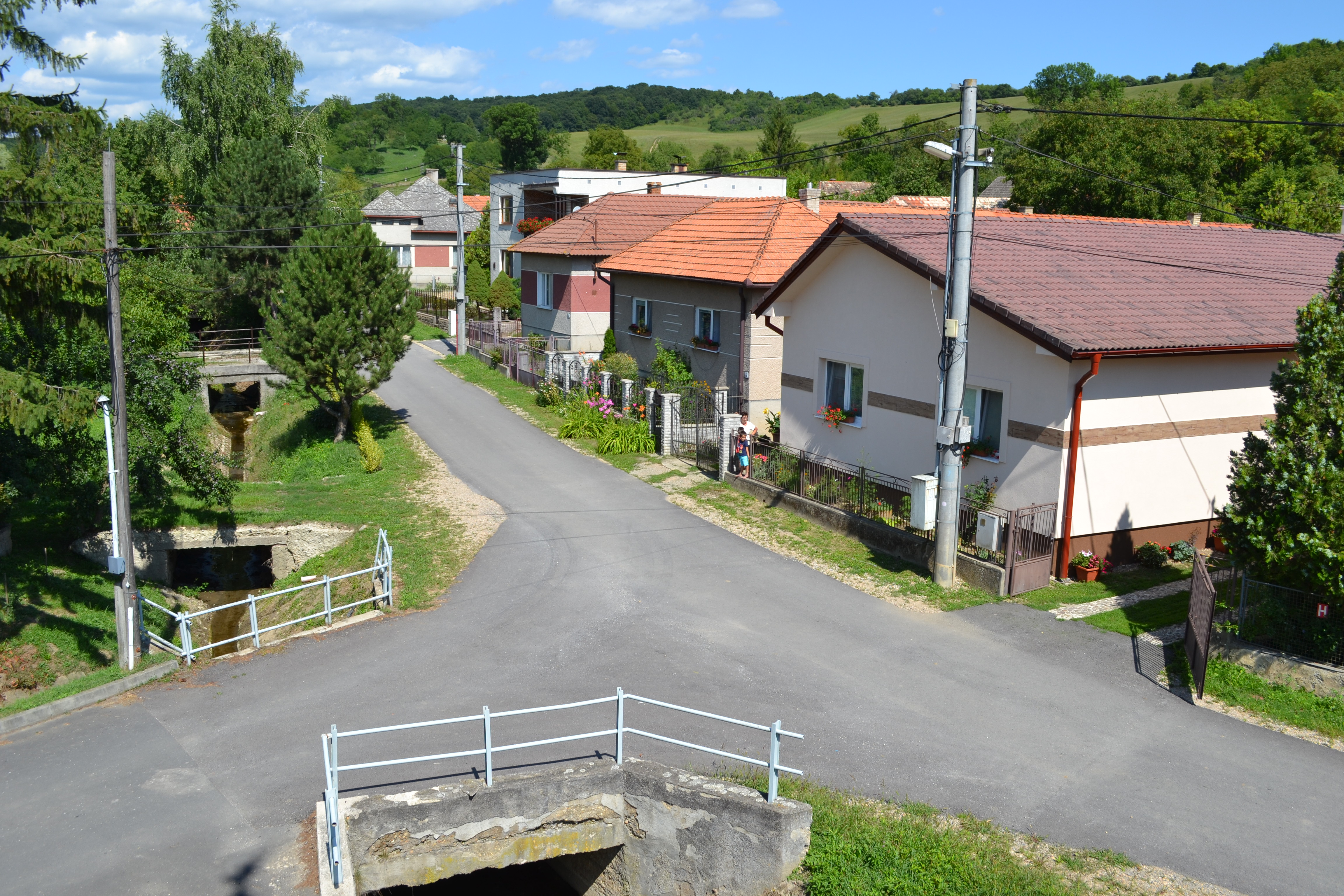 Hubovský potok pretekajúci obcou Hubovo